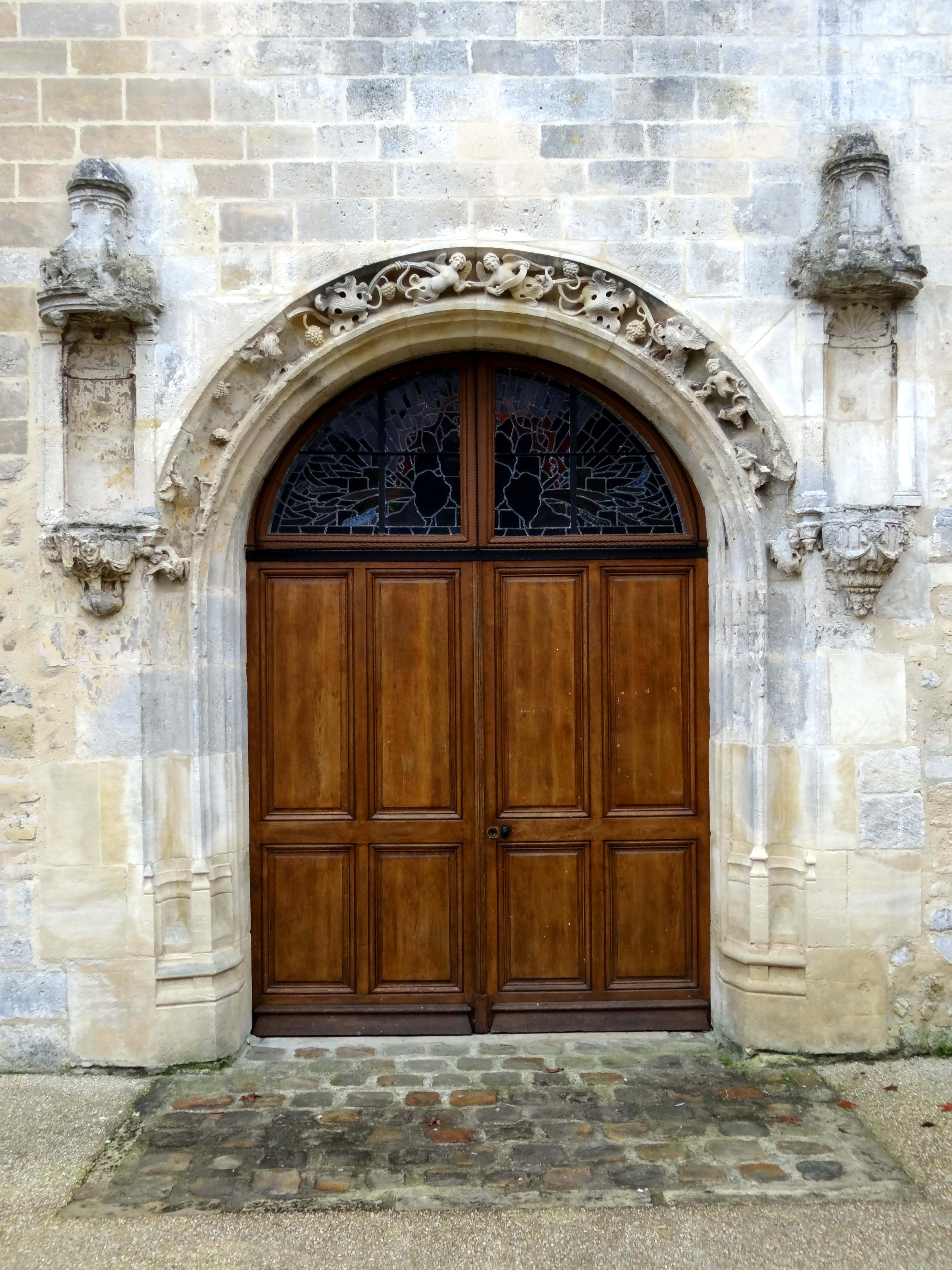 Église Saint-Martin d'Amblainville - voir titre.